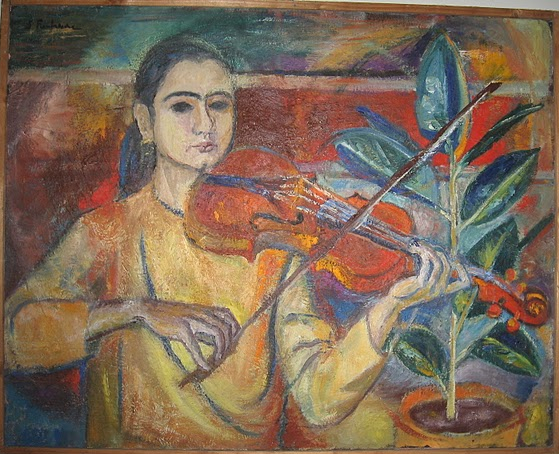 Tableau de Victor Fonfreide: joueuse de violon (propriété de Simone Fonfreide). L'auteur est mort depuis + de 70 ans.